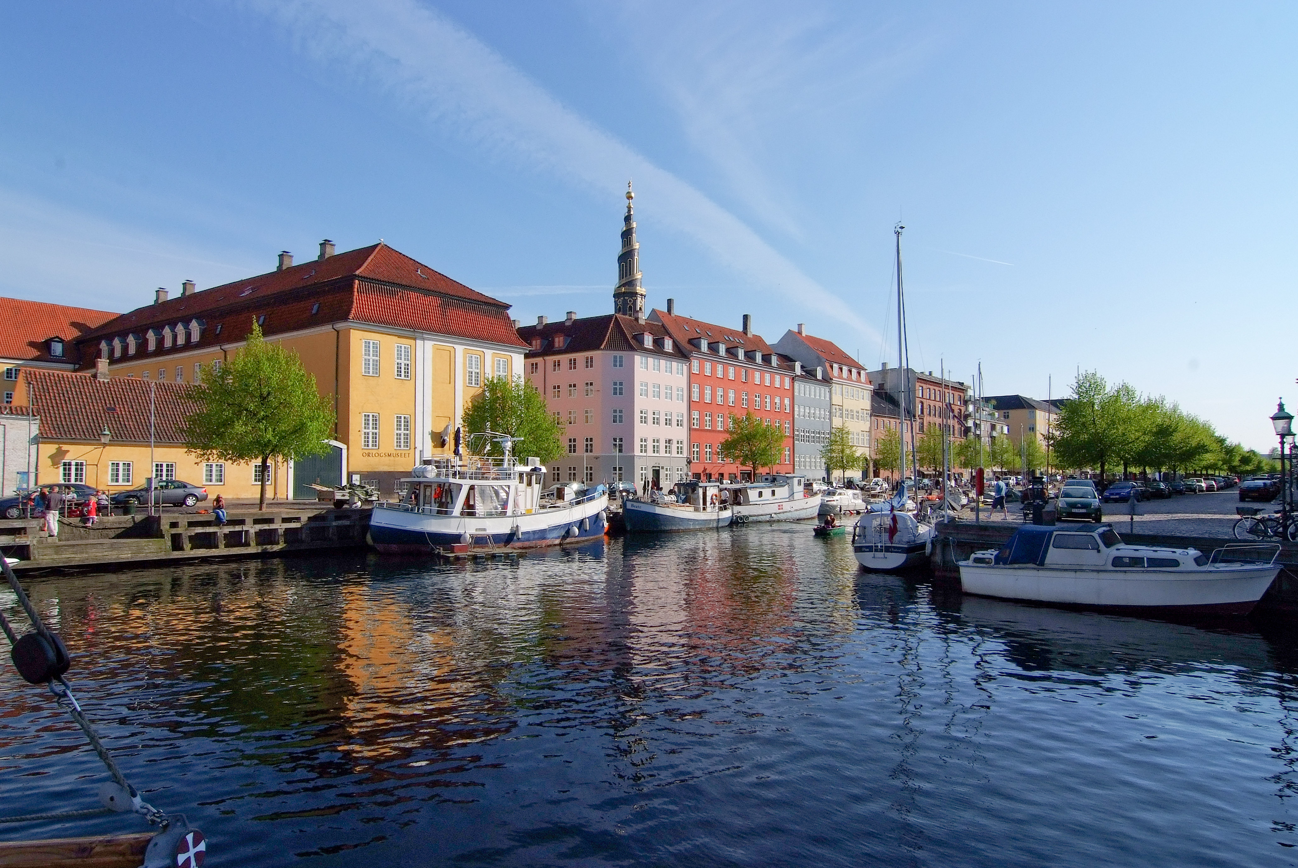 Christianshavns Kanal with Søkvæsthuset in Copenhagen, Denmark